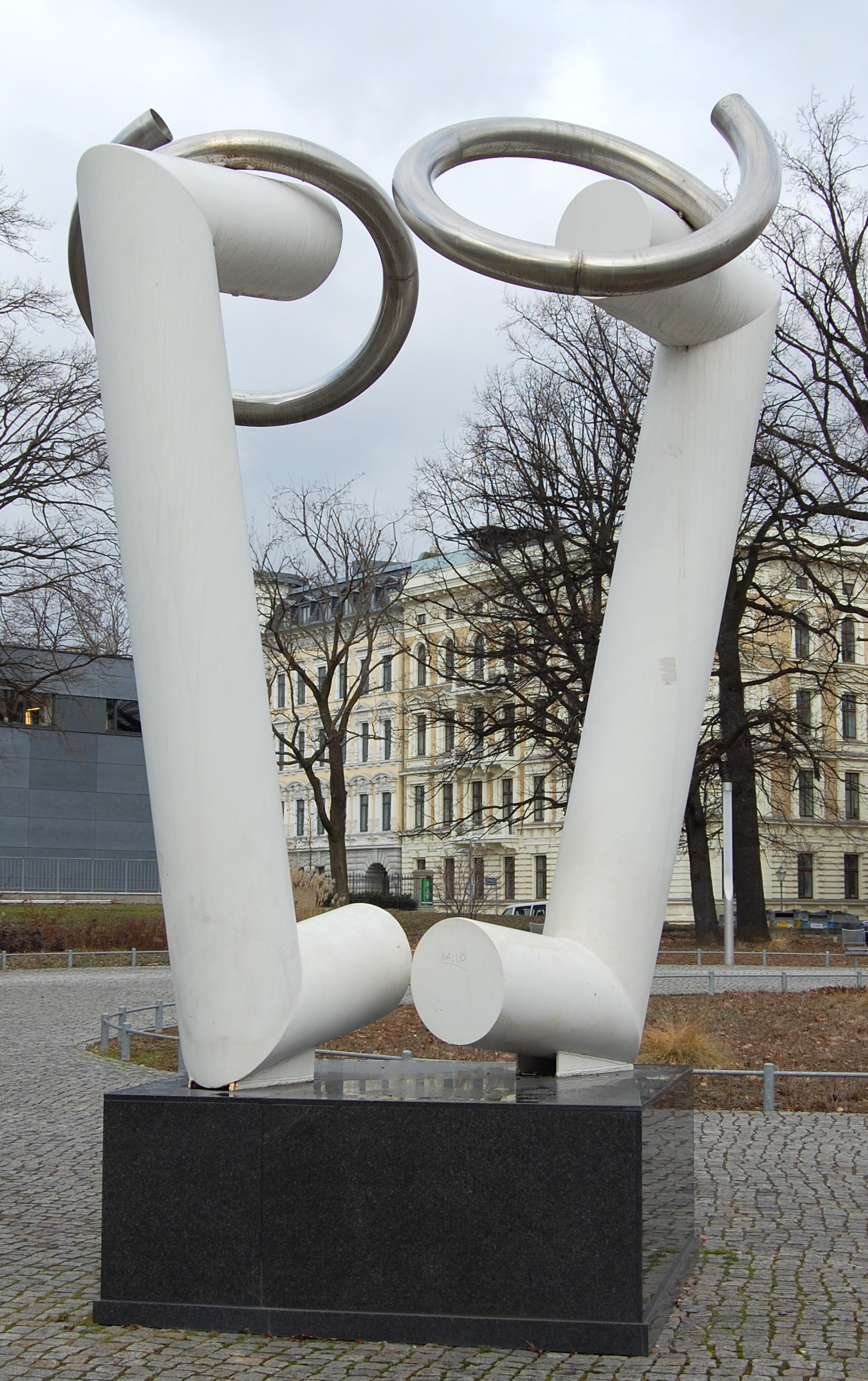 Plastik Vacanz von Irmtraud Ohme in Magdeburg